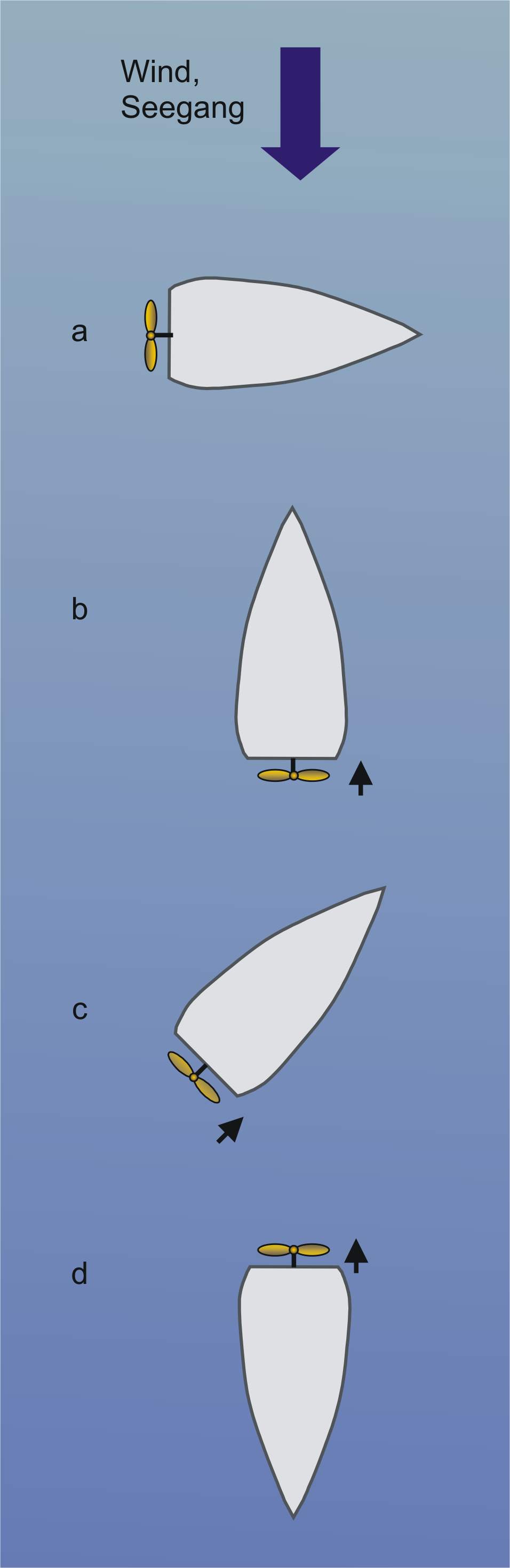 Vier verschiedene Möglichkeiten für Beidrehen und Beiliegen eines Motorschiffes